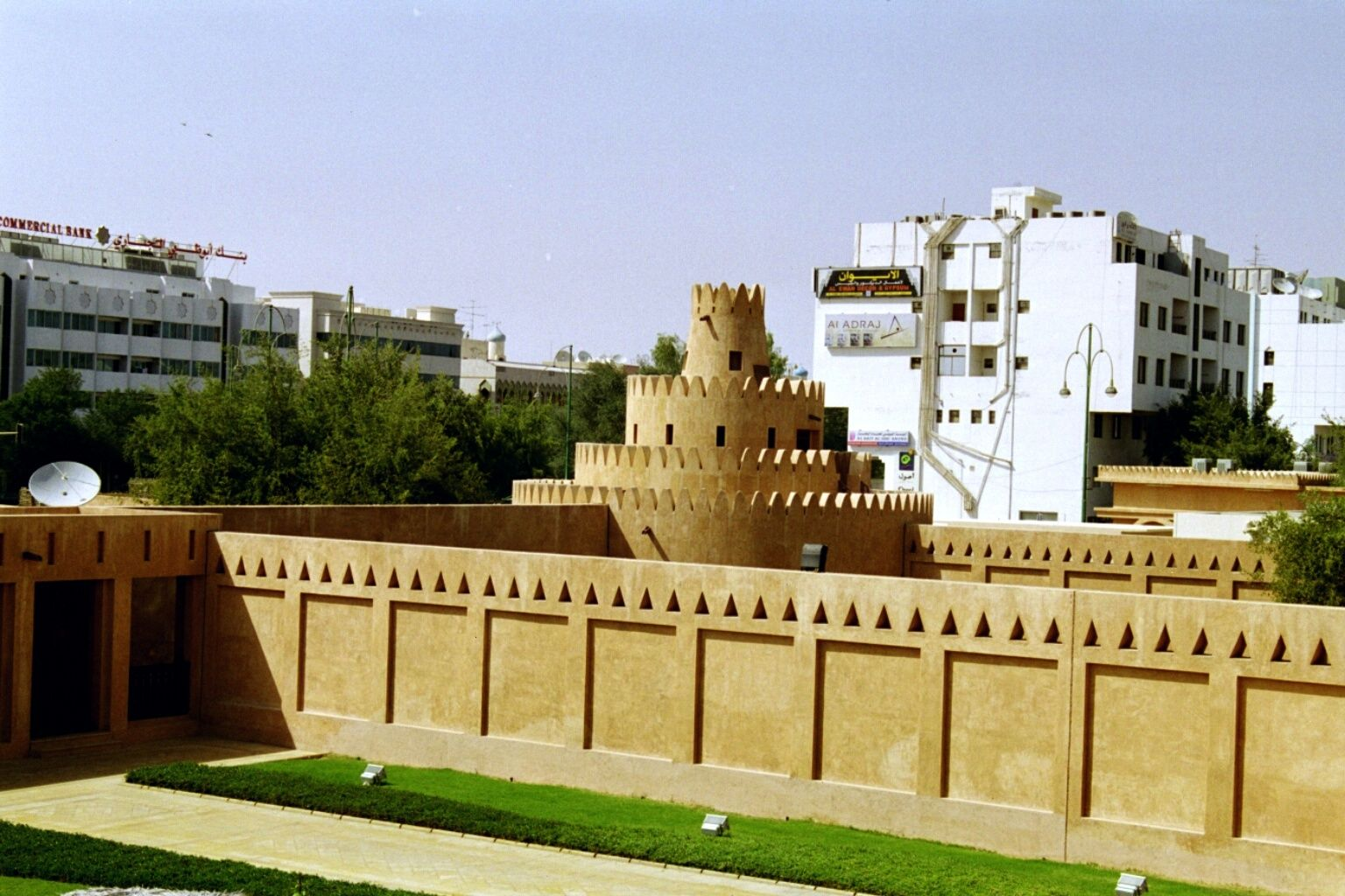 Al-Ain alter Palast